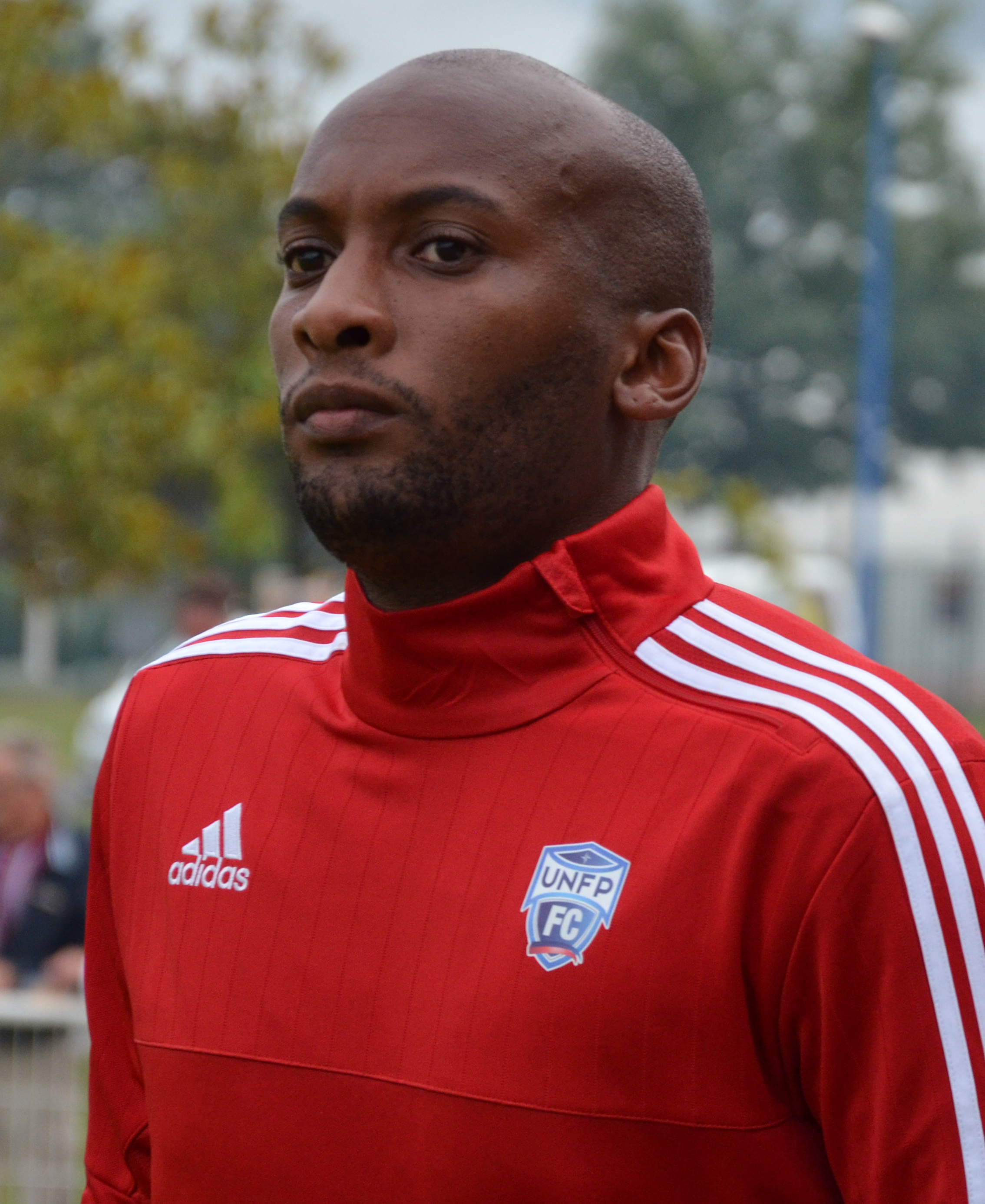 Photographie prise lors du match opposant le SM Caen à l'UNFP en match amical au stade Louis-Villemer de Saint-Lô le 30 juillet 2016. Ici, Rémi Maréval.